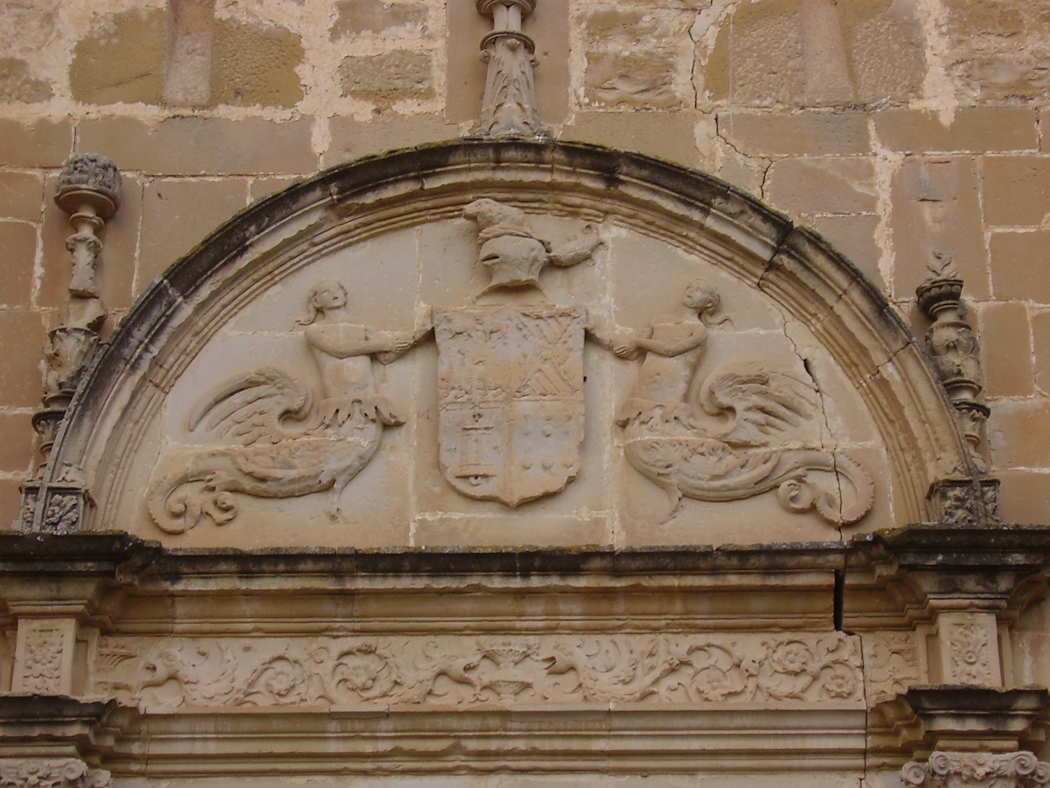 Escudos heráldicos de la puerta del castillo de Canena (Jaén)